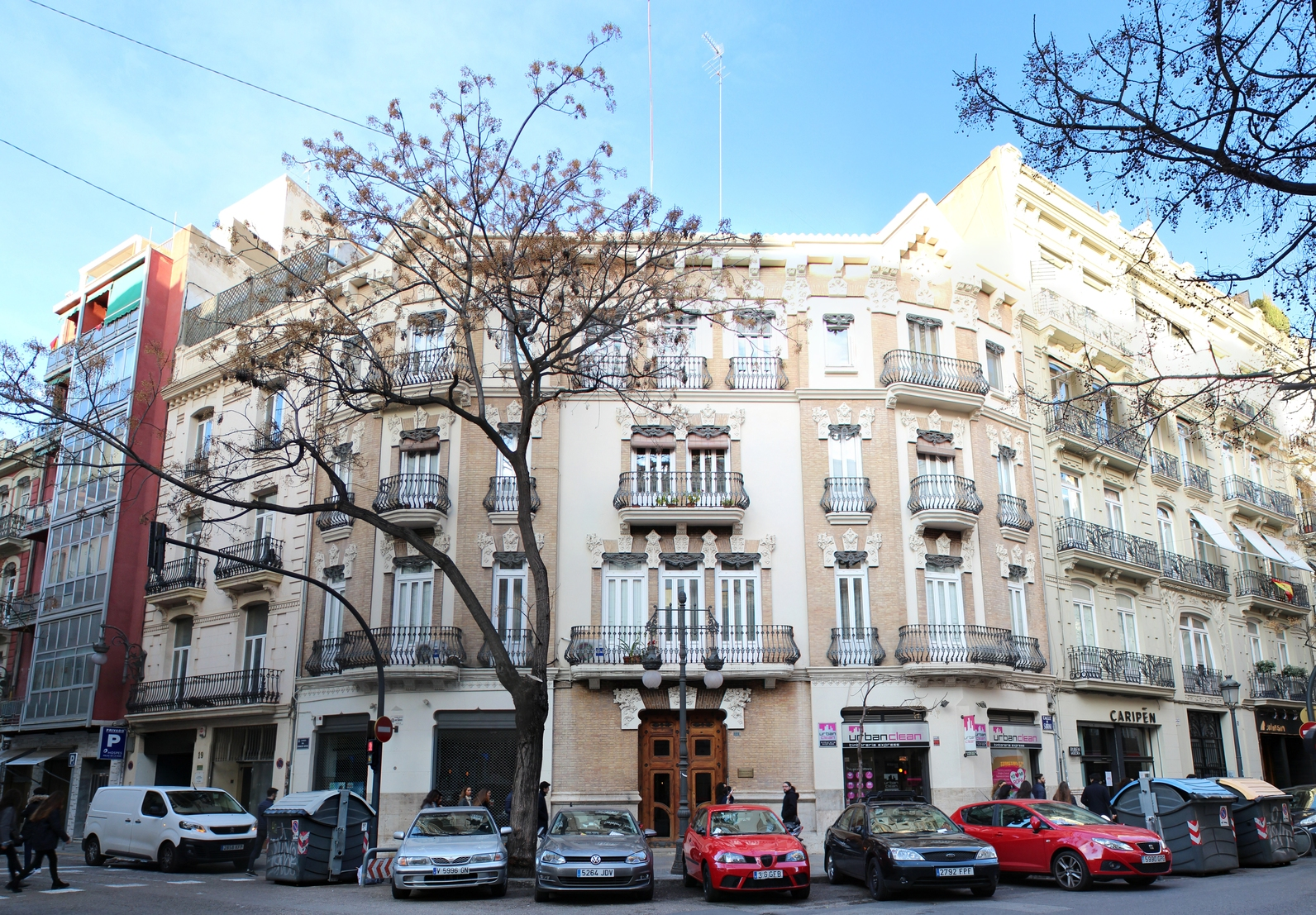 Edificio Cortina Pérez (1905) de José María Manuel Cortina Pérez en Valencia